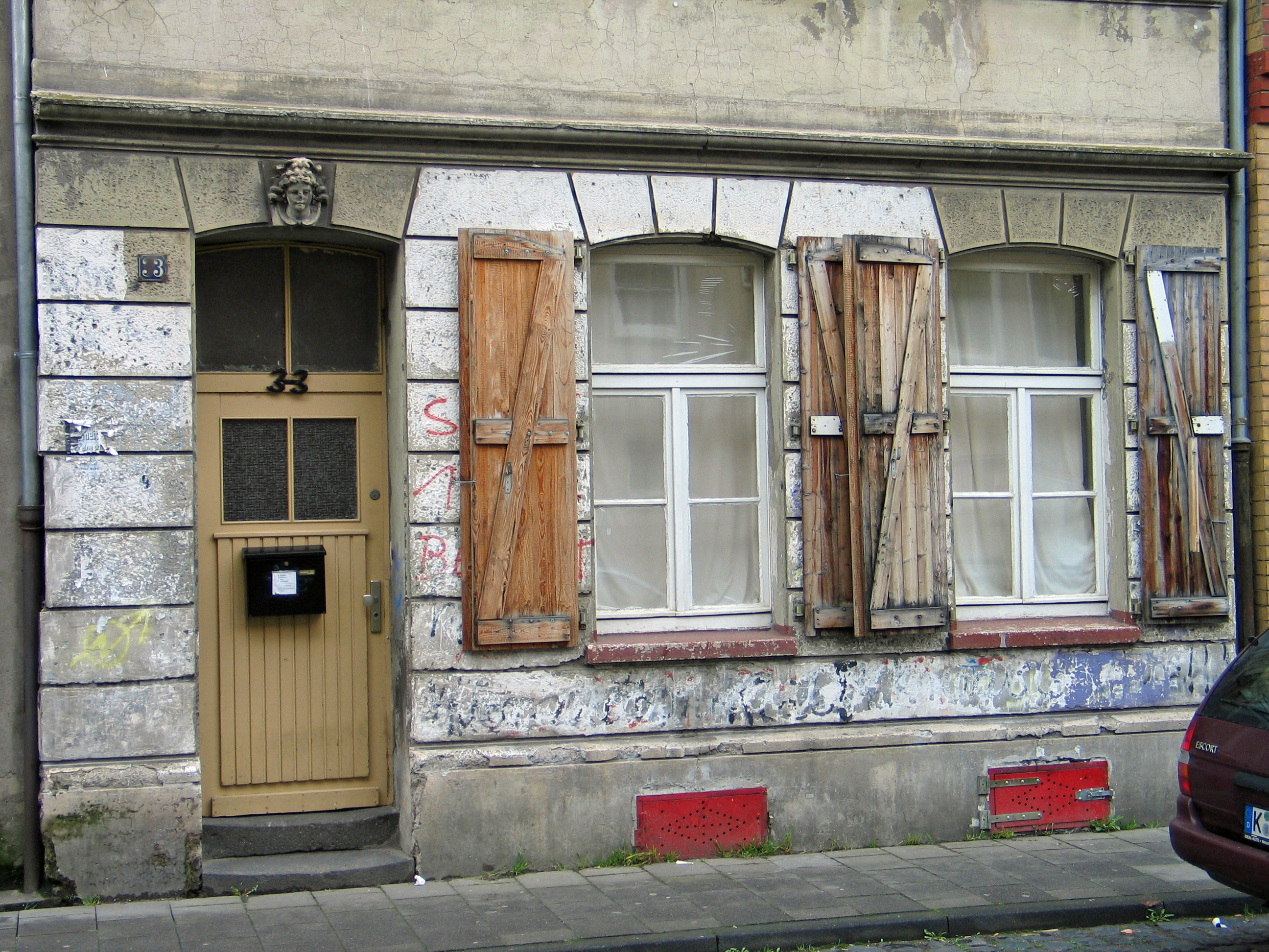 Dreifensterhaus, Marienstraße, Köln-Ehrenfeld, Köln Photograph: Superbass